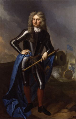 Cloudesley Shovell (* 1650; † 22. Oktober 1707), englischer Admiral